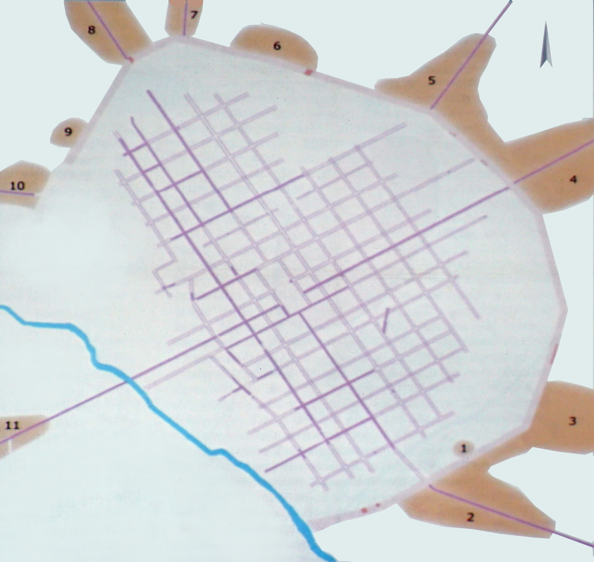 à propos de Durocortorum.